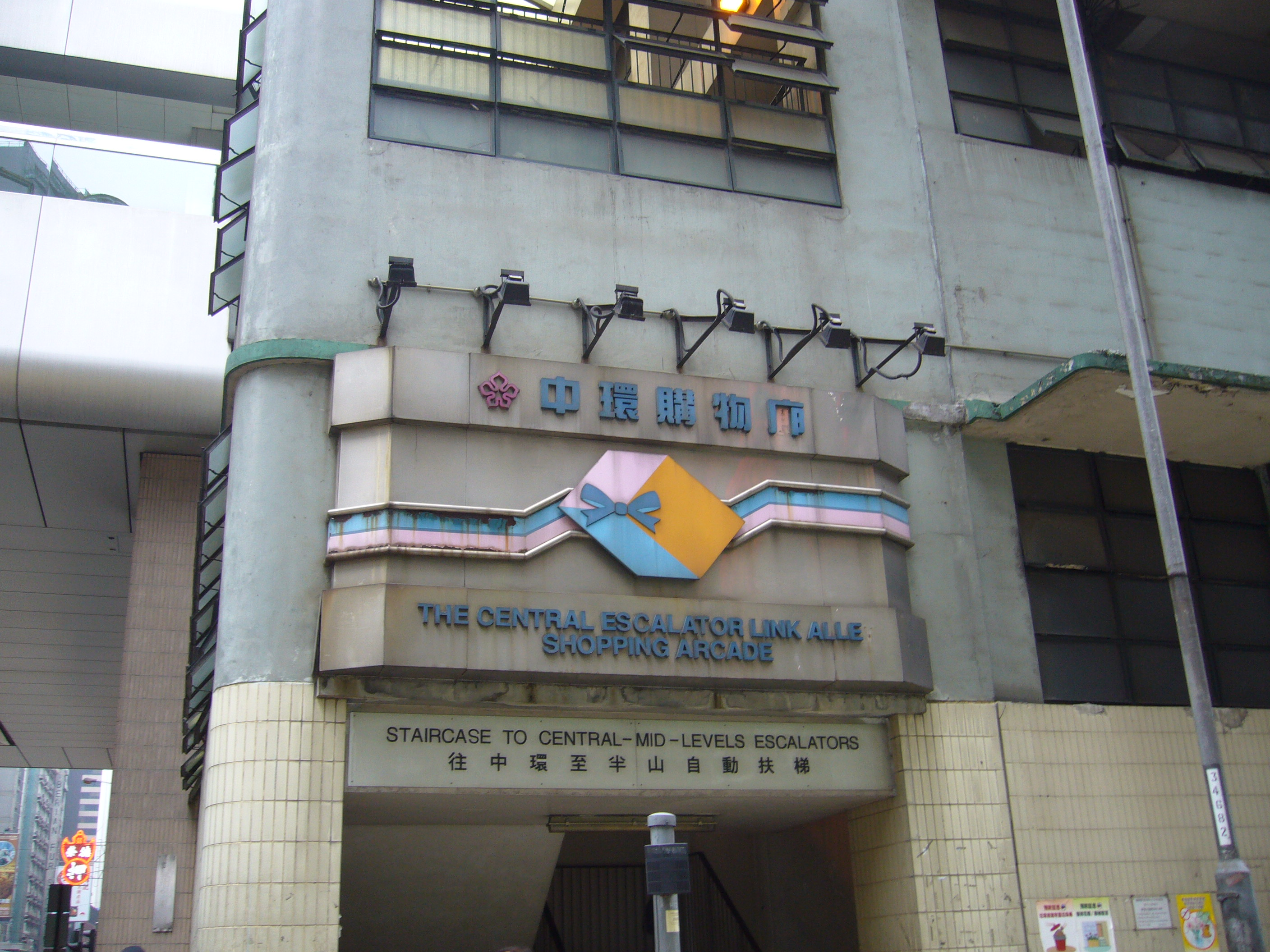 中文（香港）: 中環街市位於租庇利街的入口